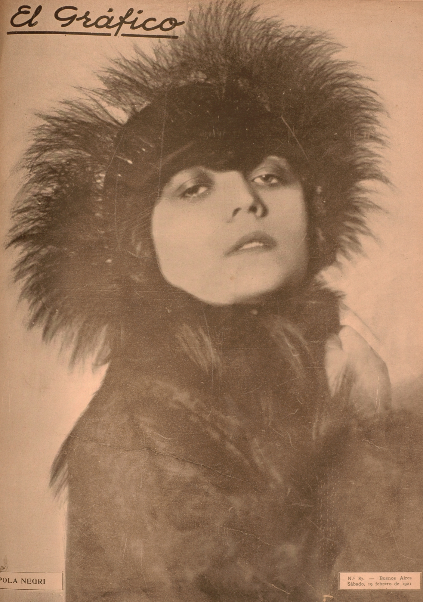 El Grafico del 19 de Febrero de 1921. Edicion 87